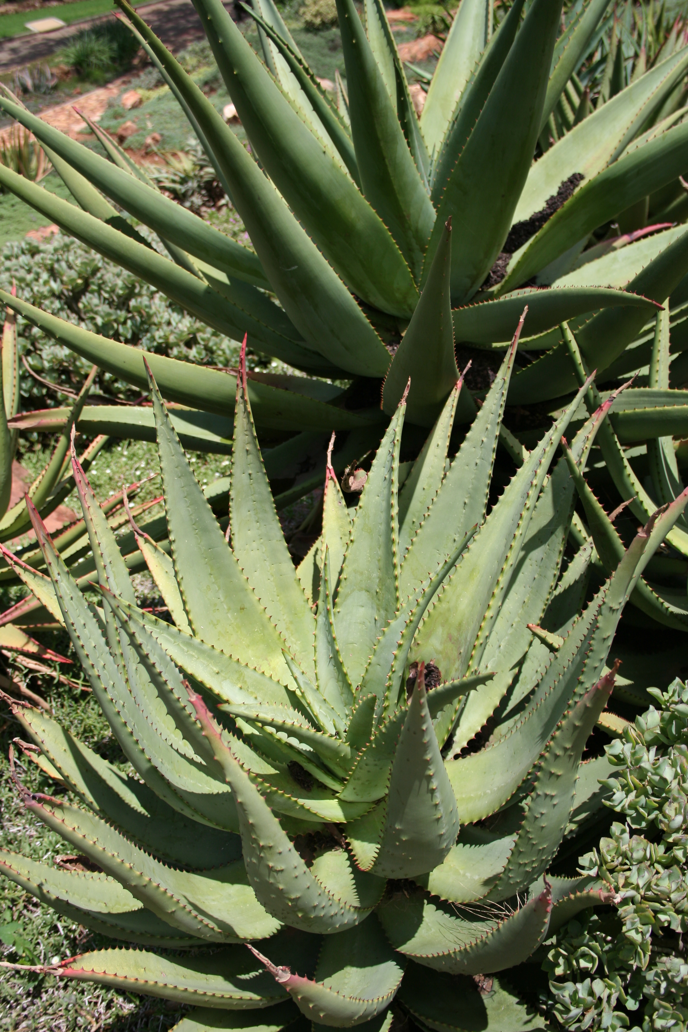 Aloe ferox, W.Sisulu Bot. Garden